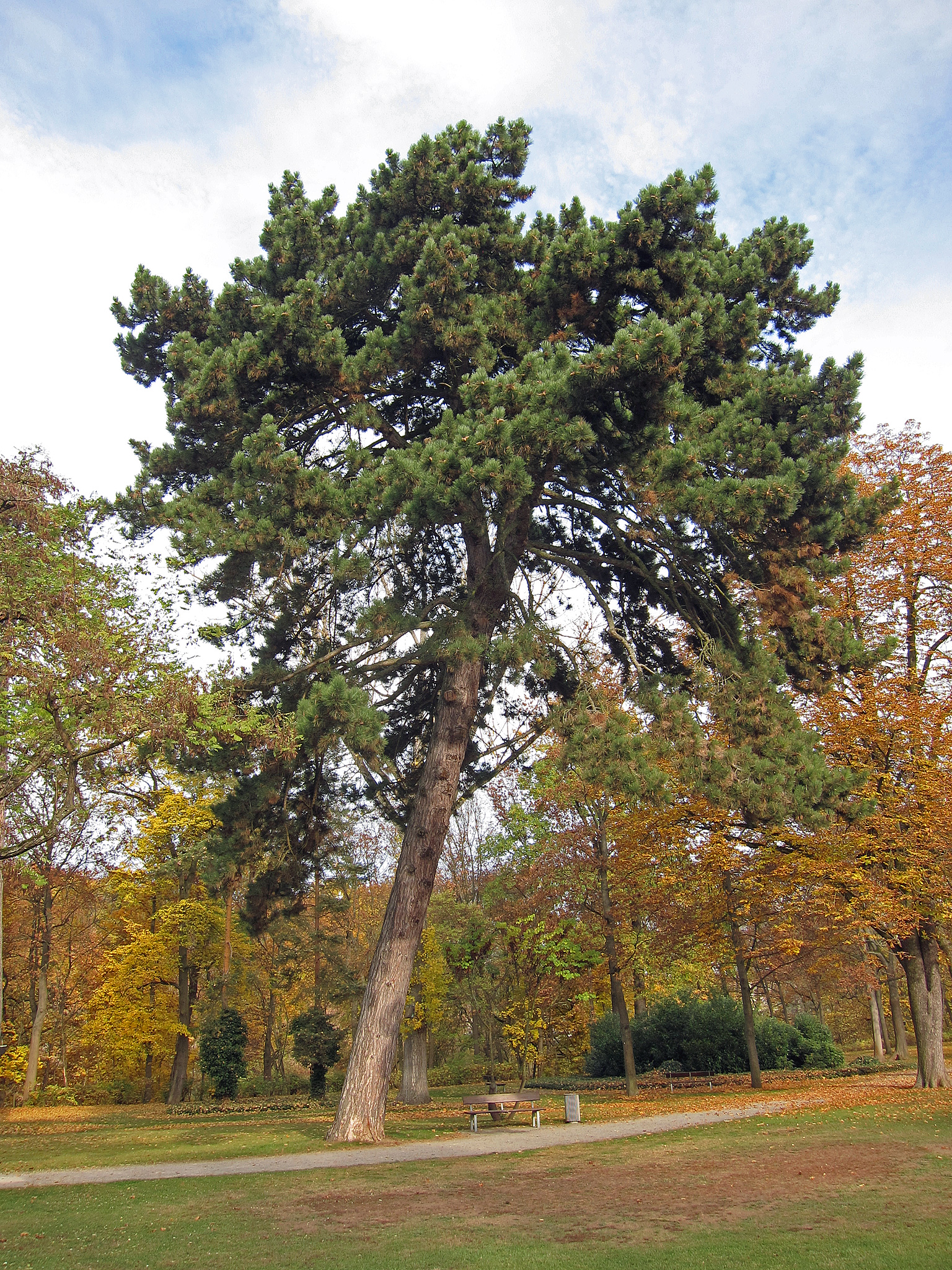 Kiefer Schweinfurt